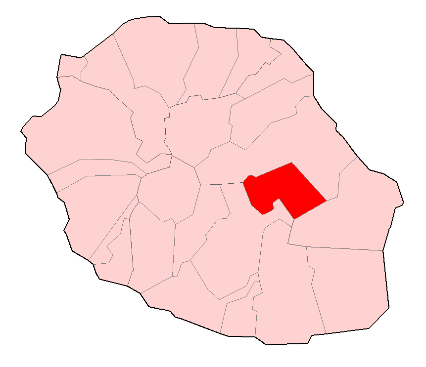 Carte de la Réunion permettant de localiser La Plaine-des-Palmistes.